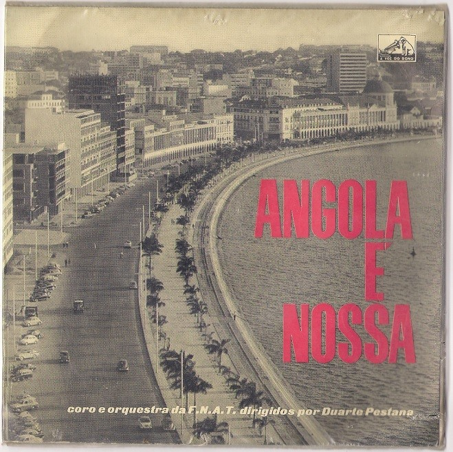 Capa do Álbum da Orquestra F.N.A.T Angola é Nossa em 1961 da editora A voz do Dono(His Masters Voice)